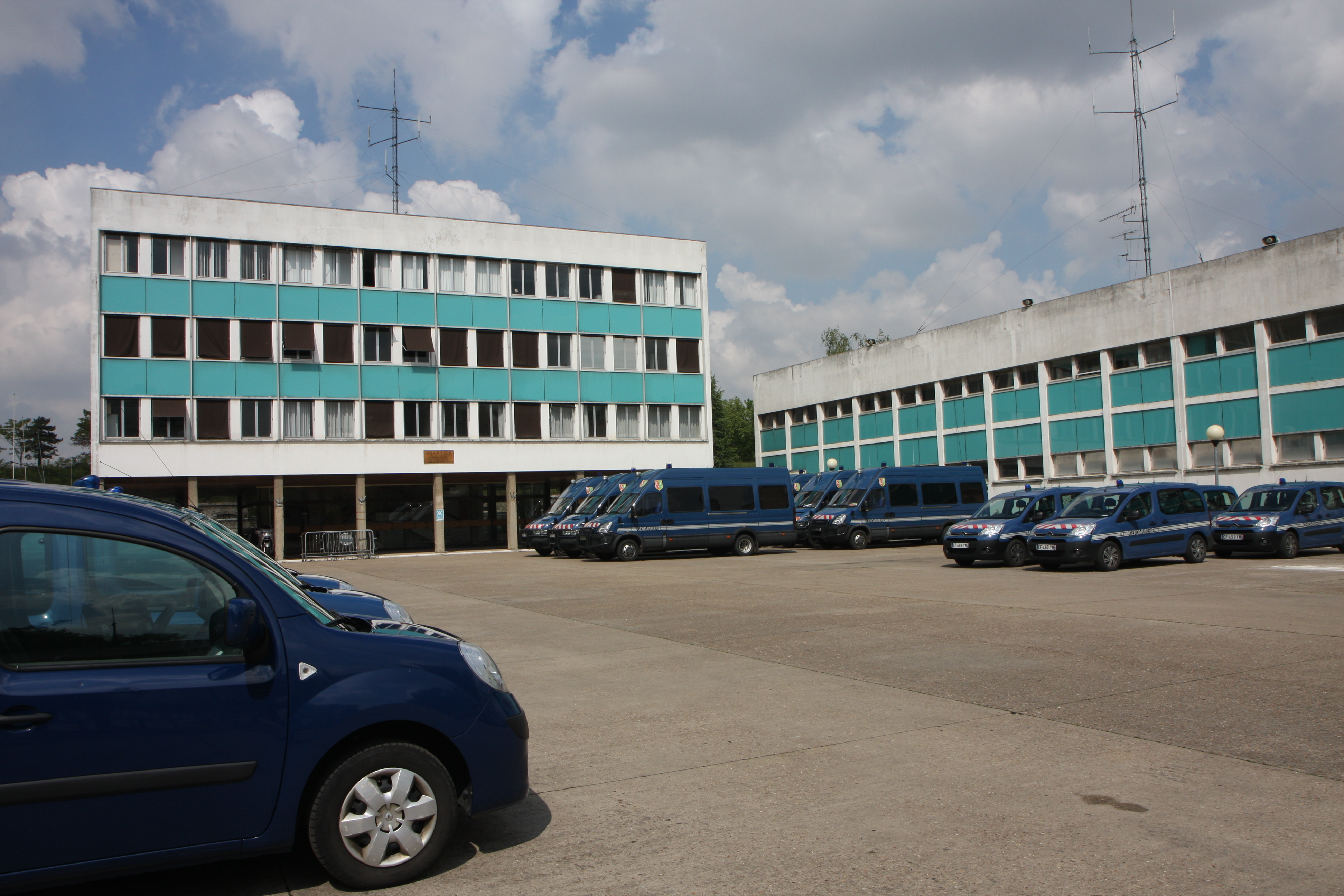 Cour du quartier Mohier et Etat-major du groupement II/1 de gendarmerie mobile à Maisons-Alfort (1)